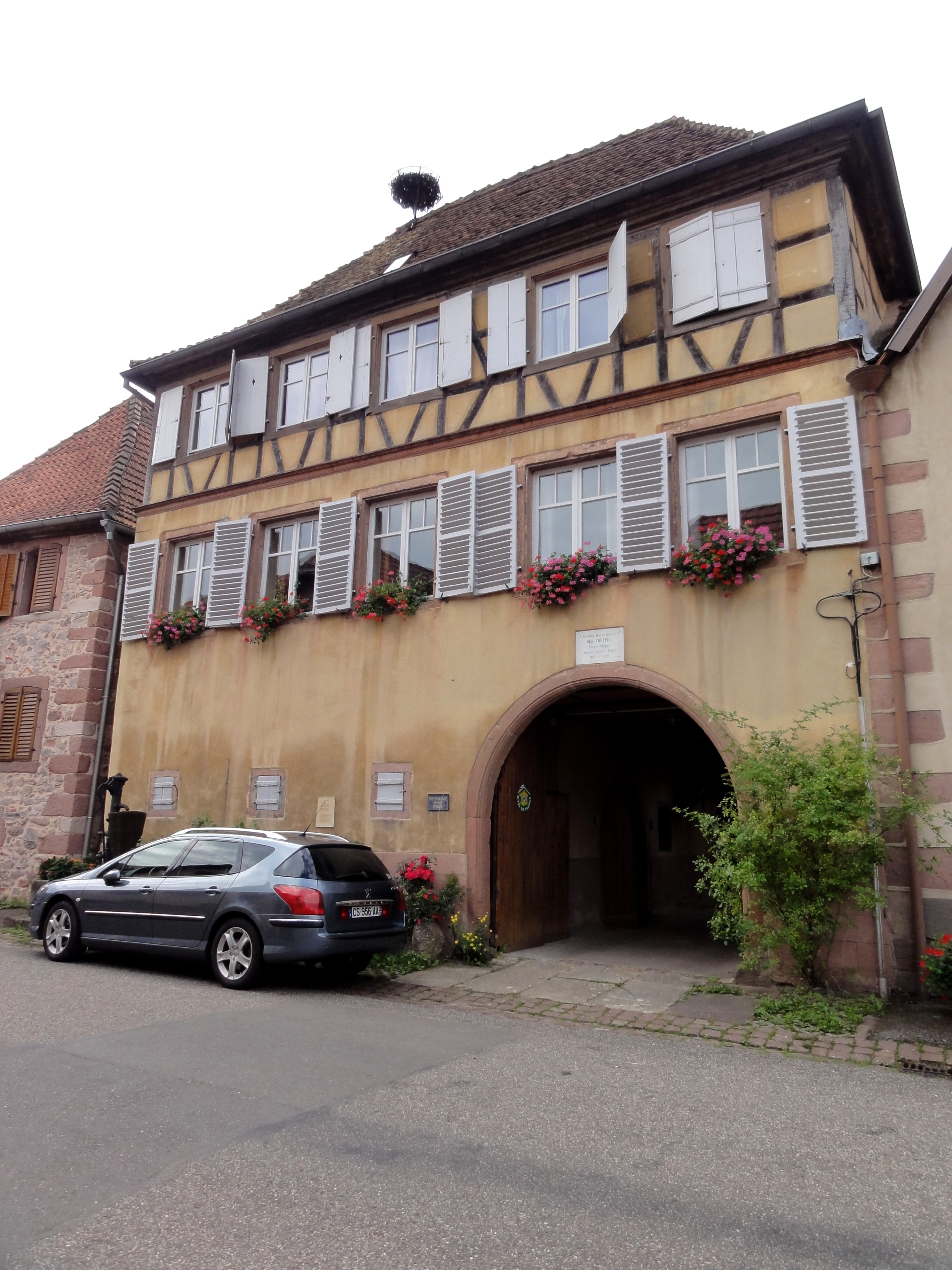 Alsace, Bas-Rhin, Blienschwiller, Maison de vigneron (1876), 24 rue du Winzenberg. .